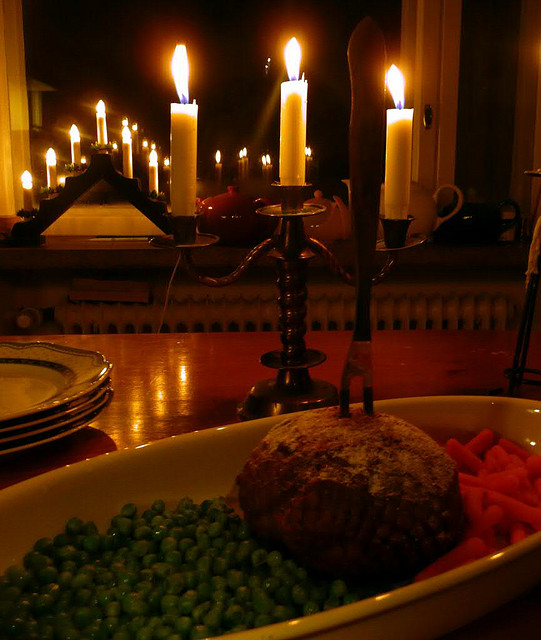 Joulukinkku